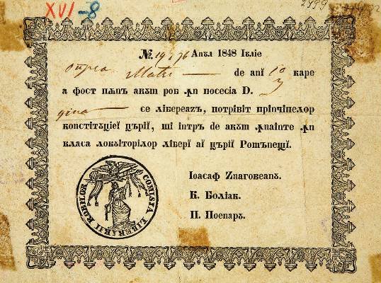 No. 14276 Anul 1848 iulie Oprea Matei, de ani 20 care a fost până acum în posesia D. I Ghica, se liberează, potrivit principelor constituției țării și intră de acum înainte în clasa locuitorilor liberi ai Țării Românești. Ioasaf Znagoveanu C. Boliac P. Poenaru Comisia Liberării Robilor